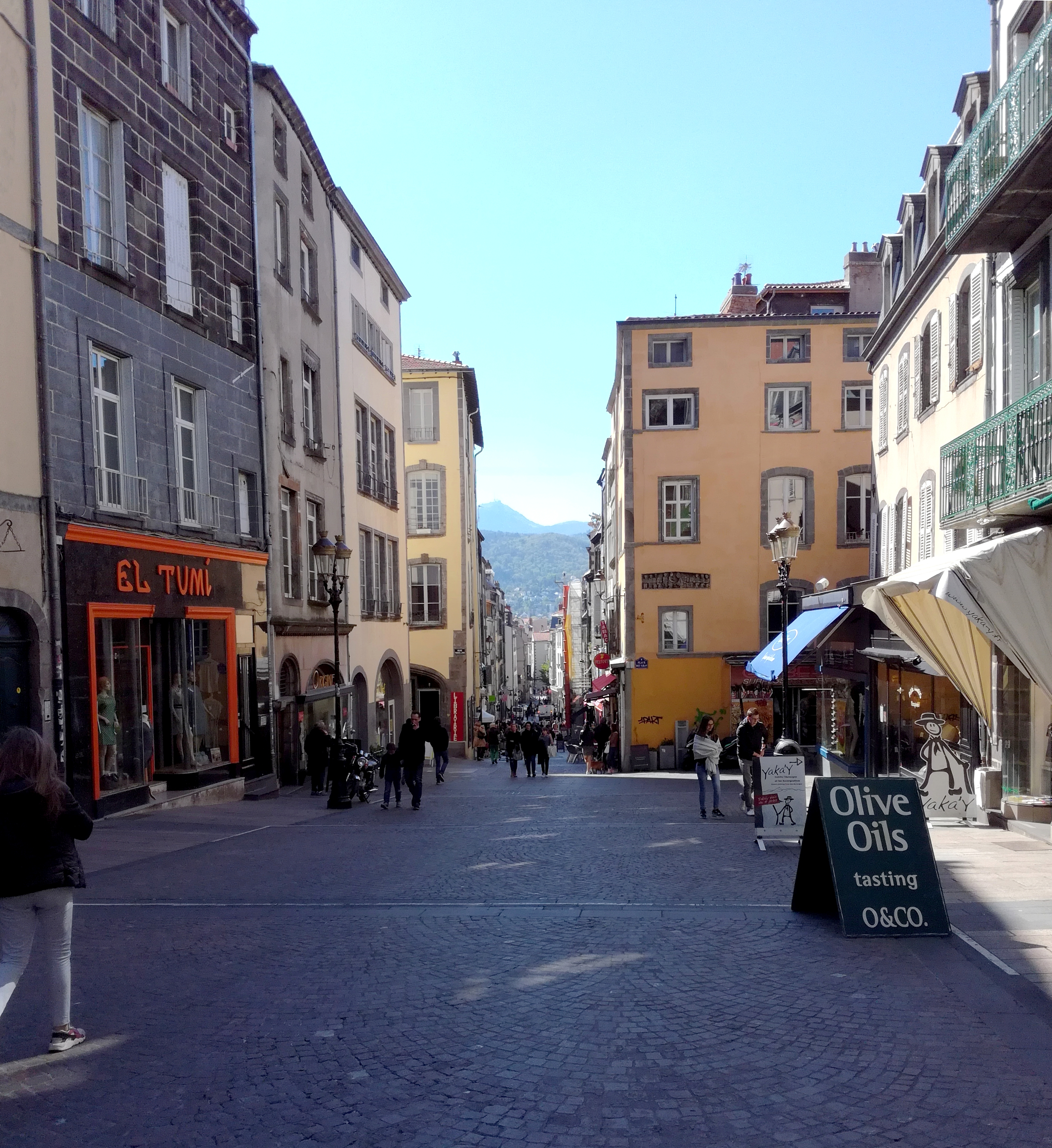 Rue des Gras, Clermont-Ferrand, France